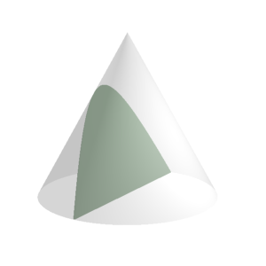 Imagem importada da wikipedia